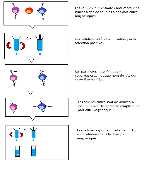 schéma explicatif d'une des technique dérivé